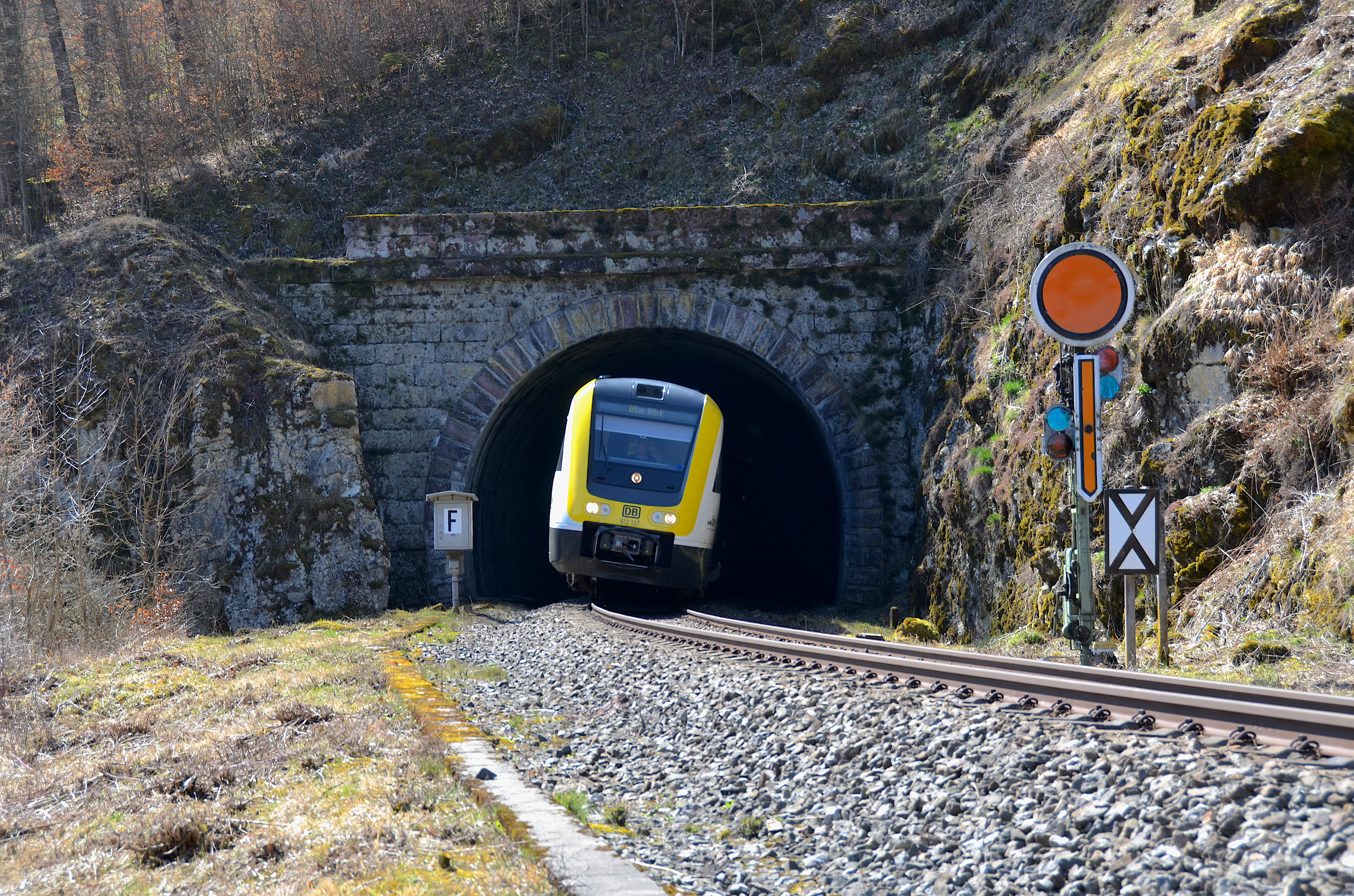 Schanztunnel Fridingen (2018)